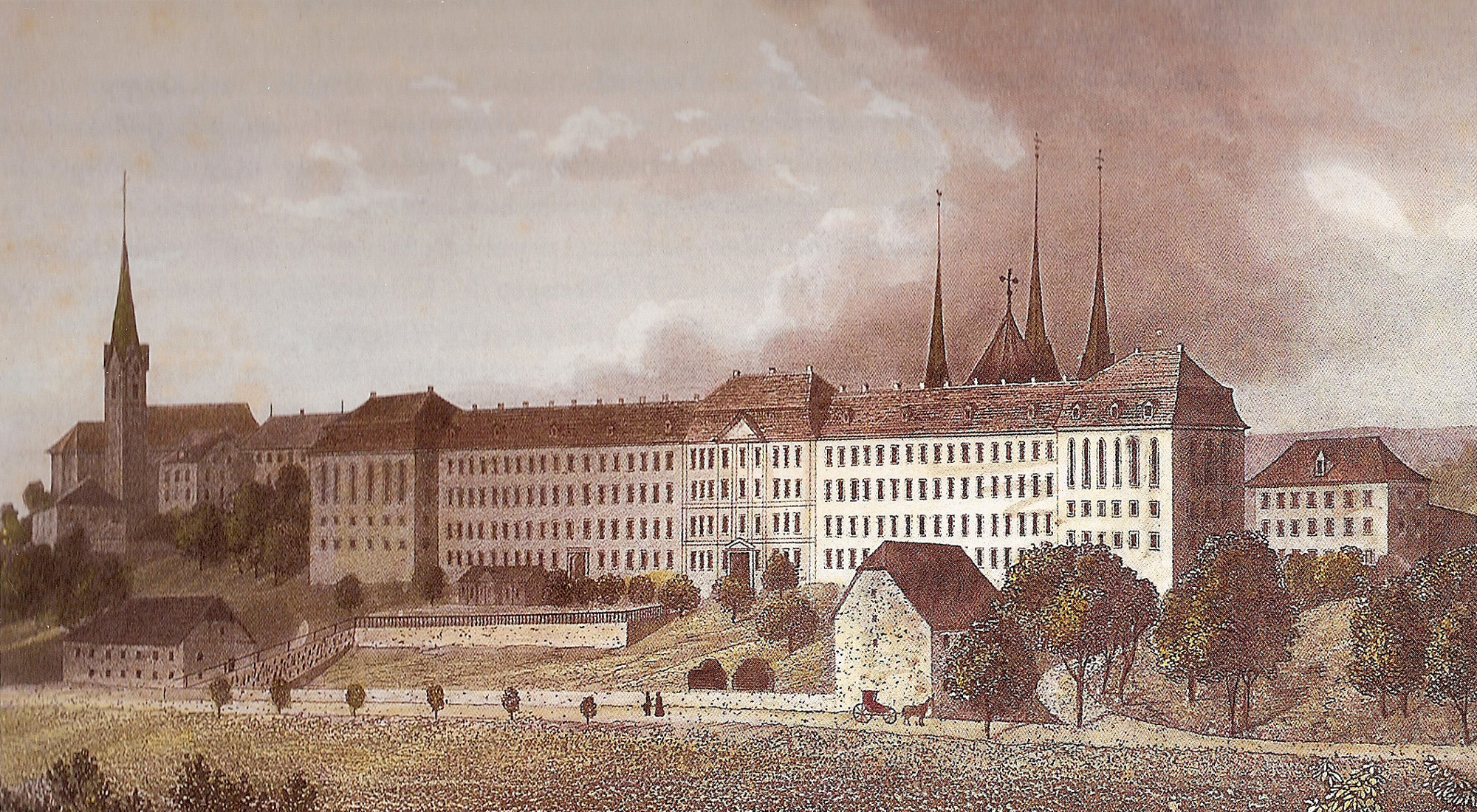 Ansicht des Klosters Muri, Lithografie